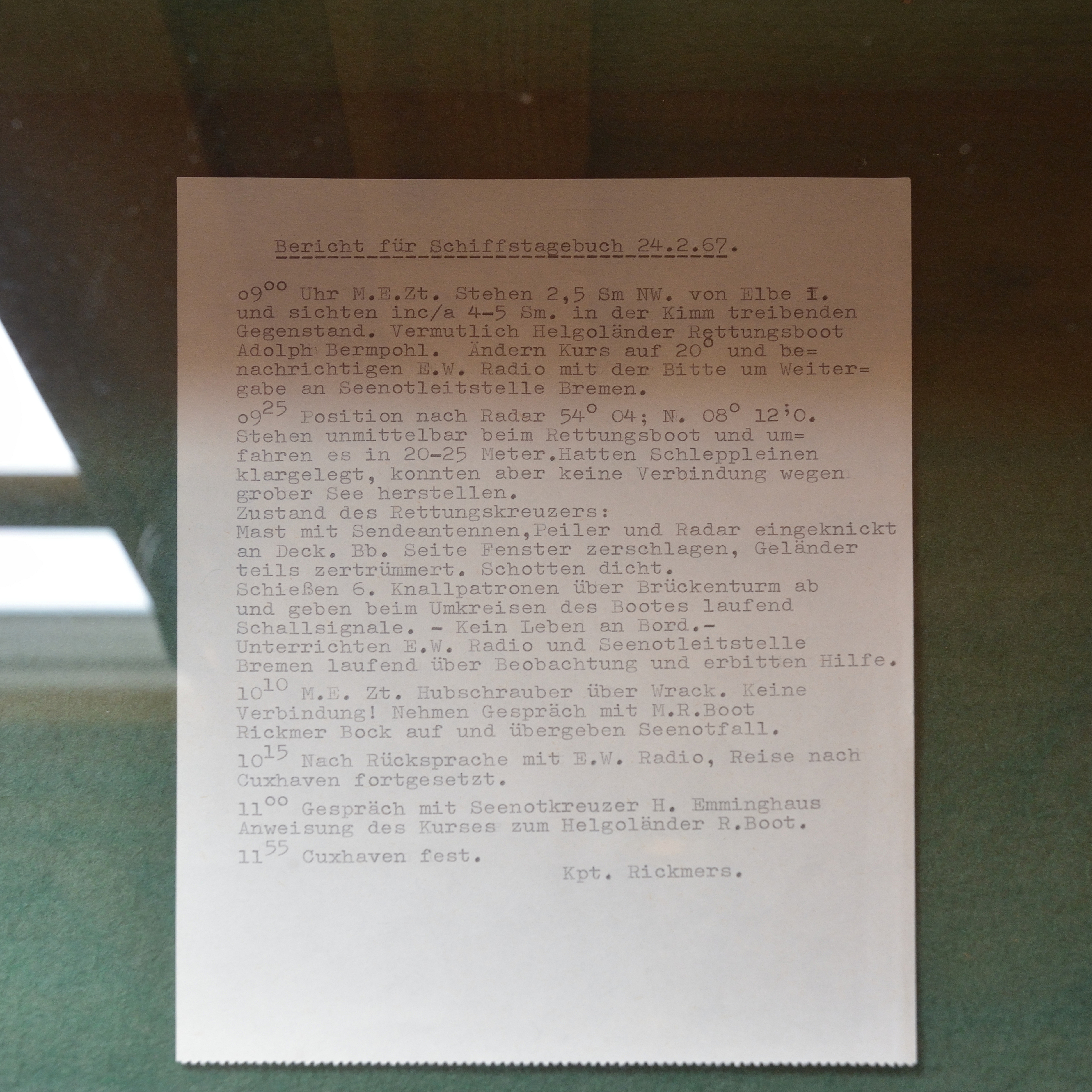 Bilder von Helgoland im Juli 2019Museum Helgoland: Bericht über das Unglück der Adolph Bermpohl